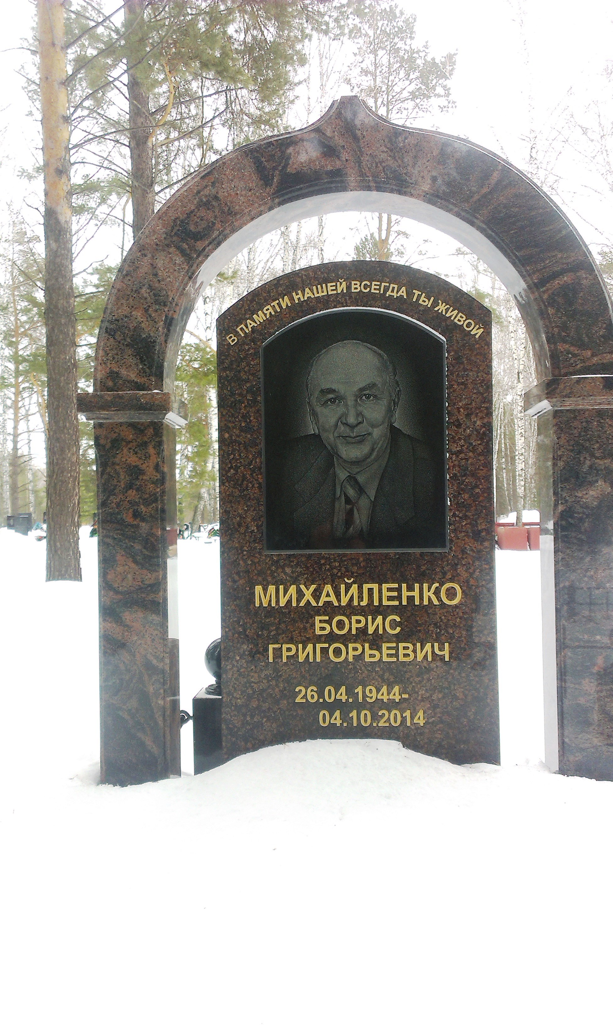 Южное кладбище в Новосибирске